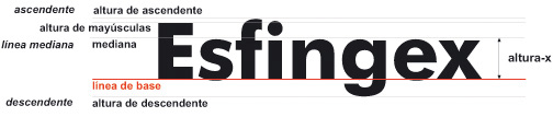 Ejemplo para visualizar las líneas guía de un tipo de letra.